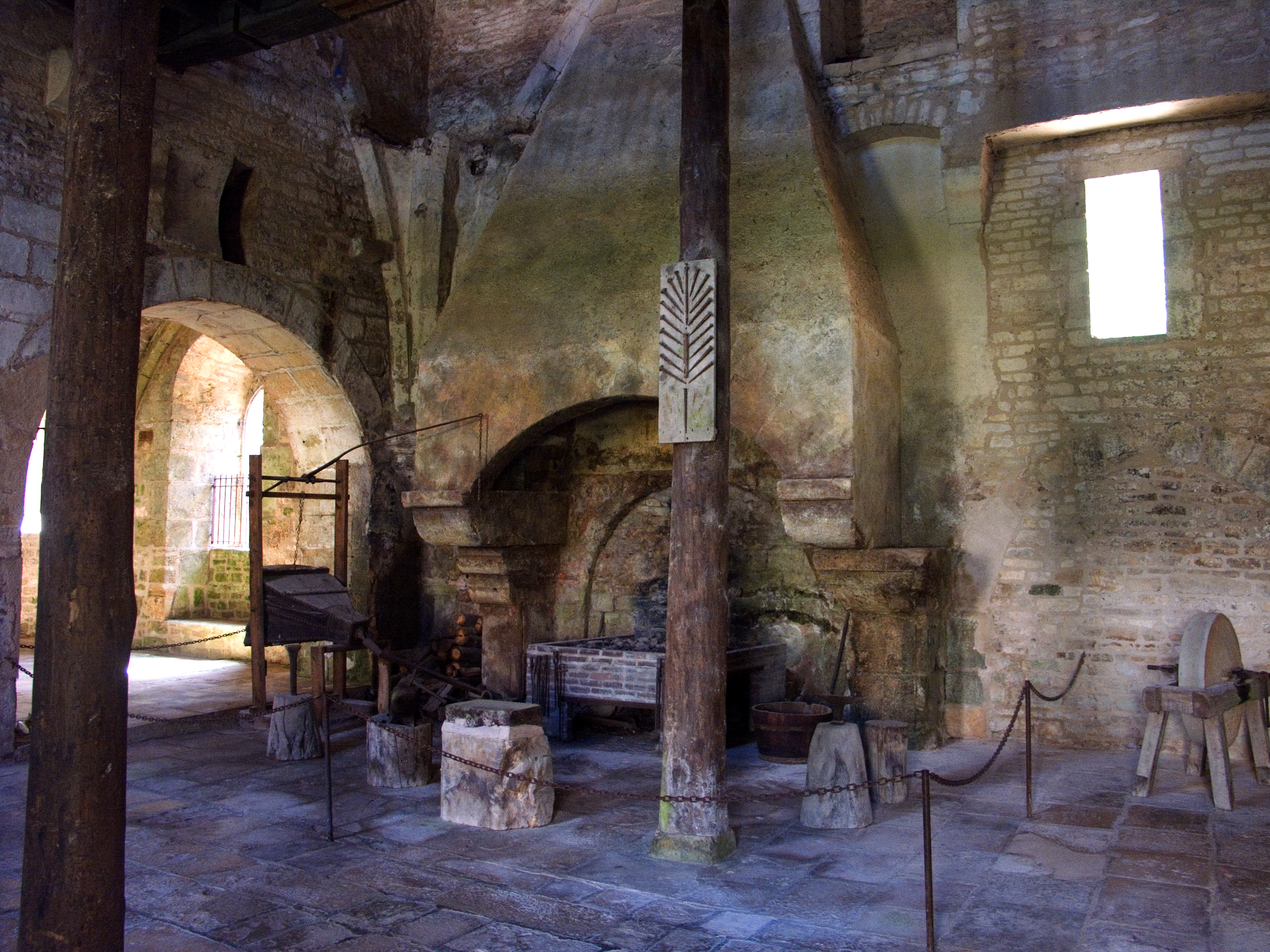 Abbaye de Fontenay - Forge